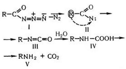 Կուրցիուսի ռեակցիա